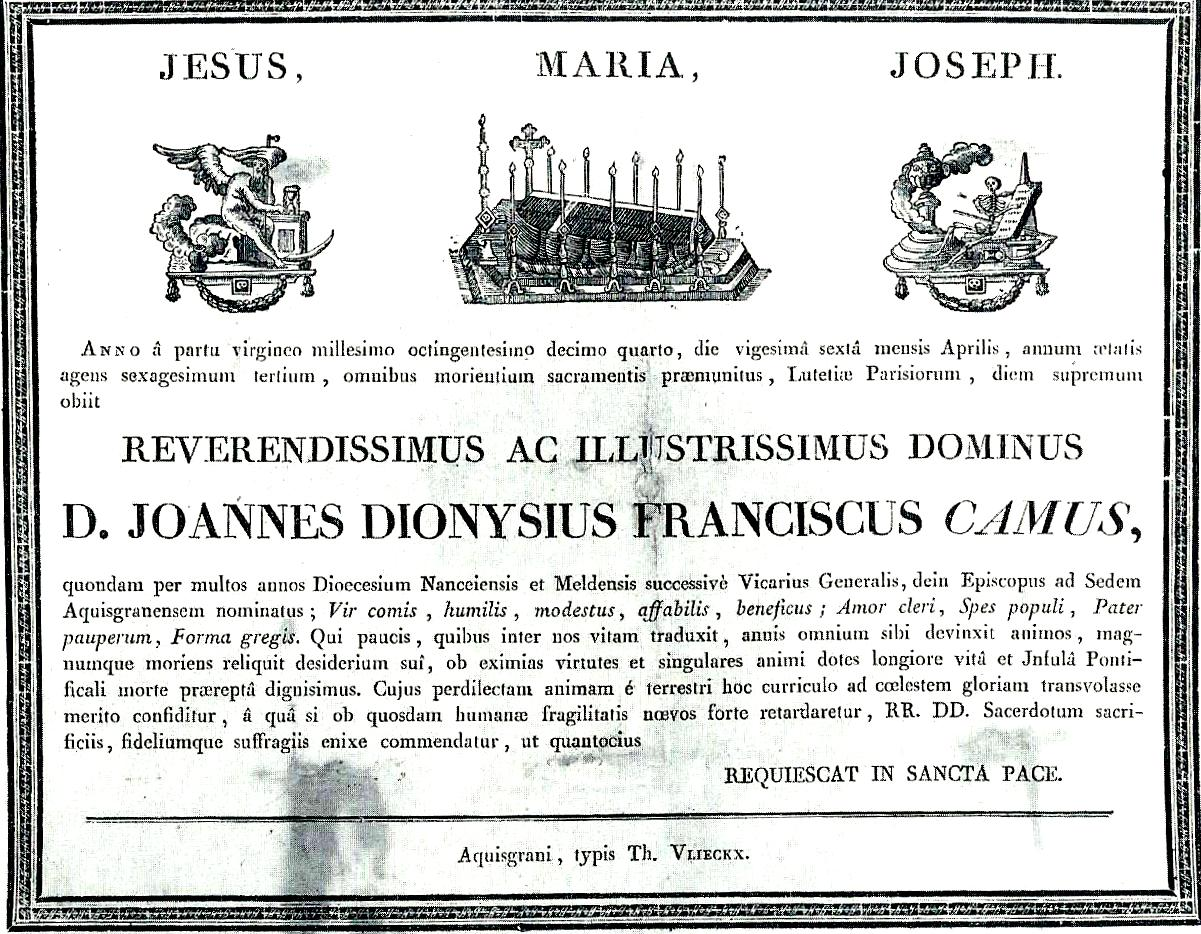 Todesanzeige Jean Camus im Domarchiv Aachen und im StA Aachen